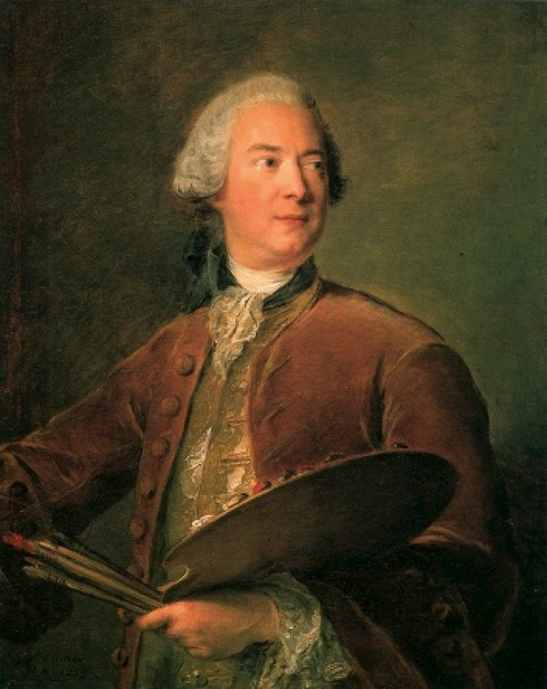 Depicted person: Louis Tocqué (1696–1772), French painter